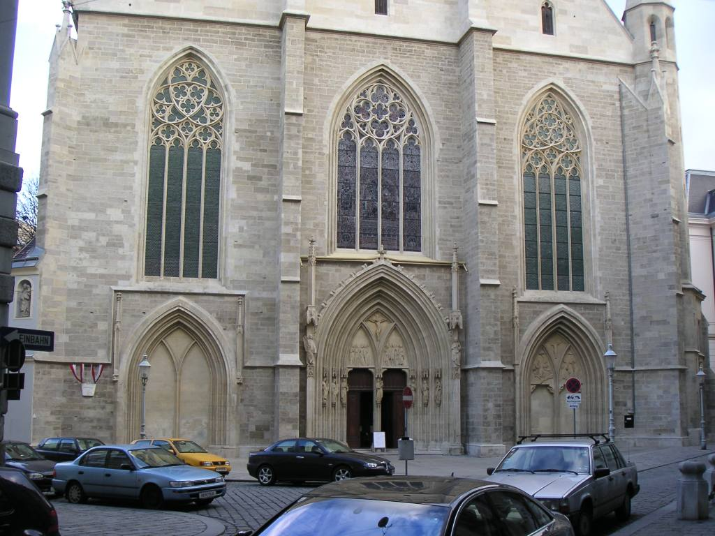 die Minoritenkirche in Wien